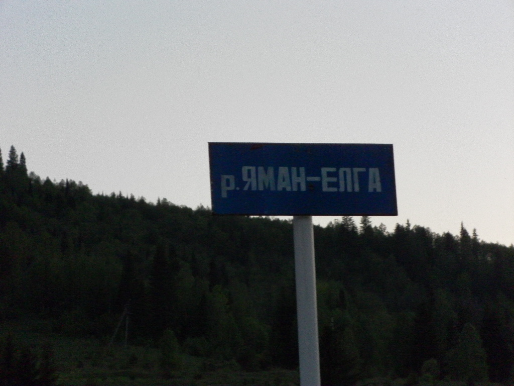 River Yaman-Yelga, tributary R. Ufa.